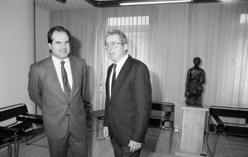 Bonn, 1. März 1989 Der Parlamentarische Staatssekretär im Bundesministerium für Arbeit und Sozialordnung, Wolfgang Vogt (r.), empfing den Spanischen Minister für Arbeit und soziale Sicherheit, Manuel Chaves Gonzales, im Bundesarbeitsministerium. Im Mittelpunkt der Gespräche stand die soziale Dimension des Europäischen Binnenmarktes.